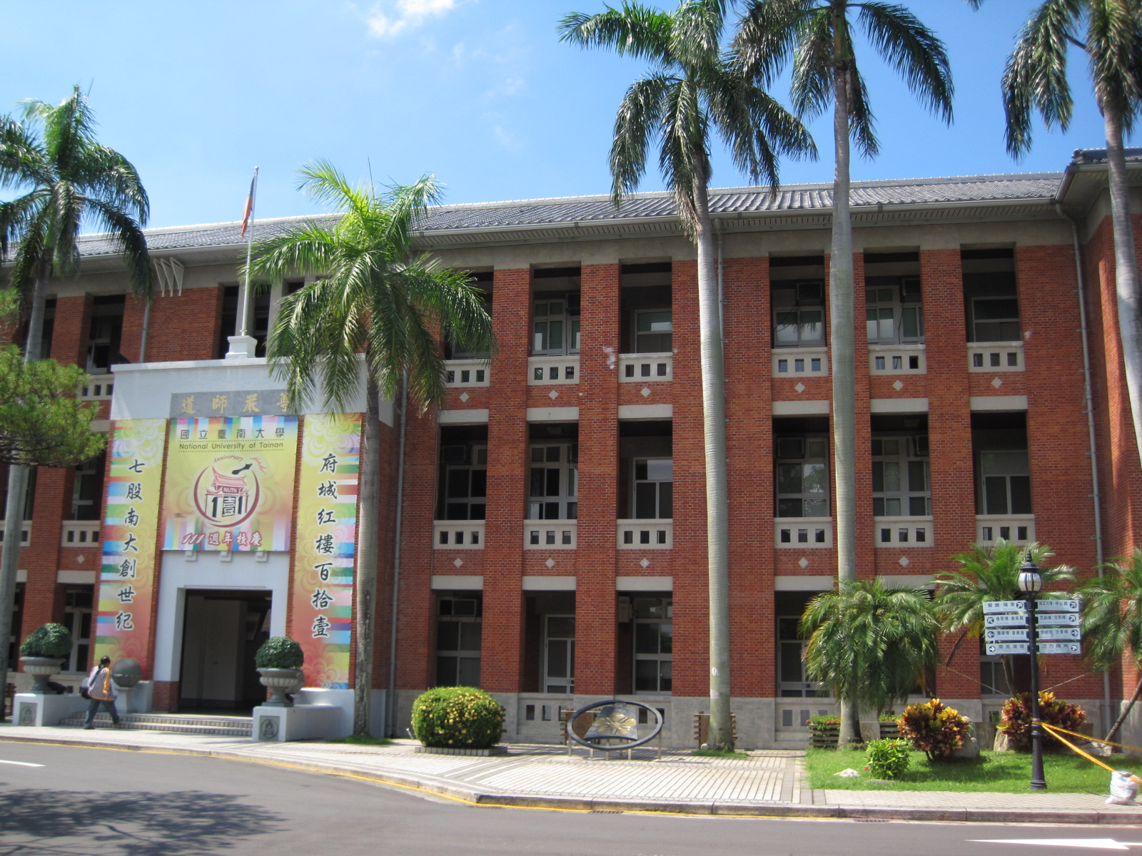 臺南大學紅樓北側入口